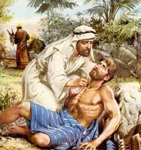 Imagen de la parábola del buen Samaritano del evangelio de San Lucas